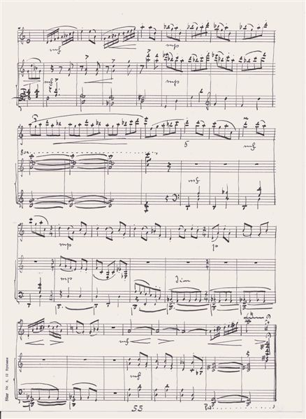 Alfred Huth - Musik für Flöte und Klavier (1951), S. 6